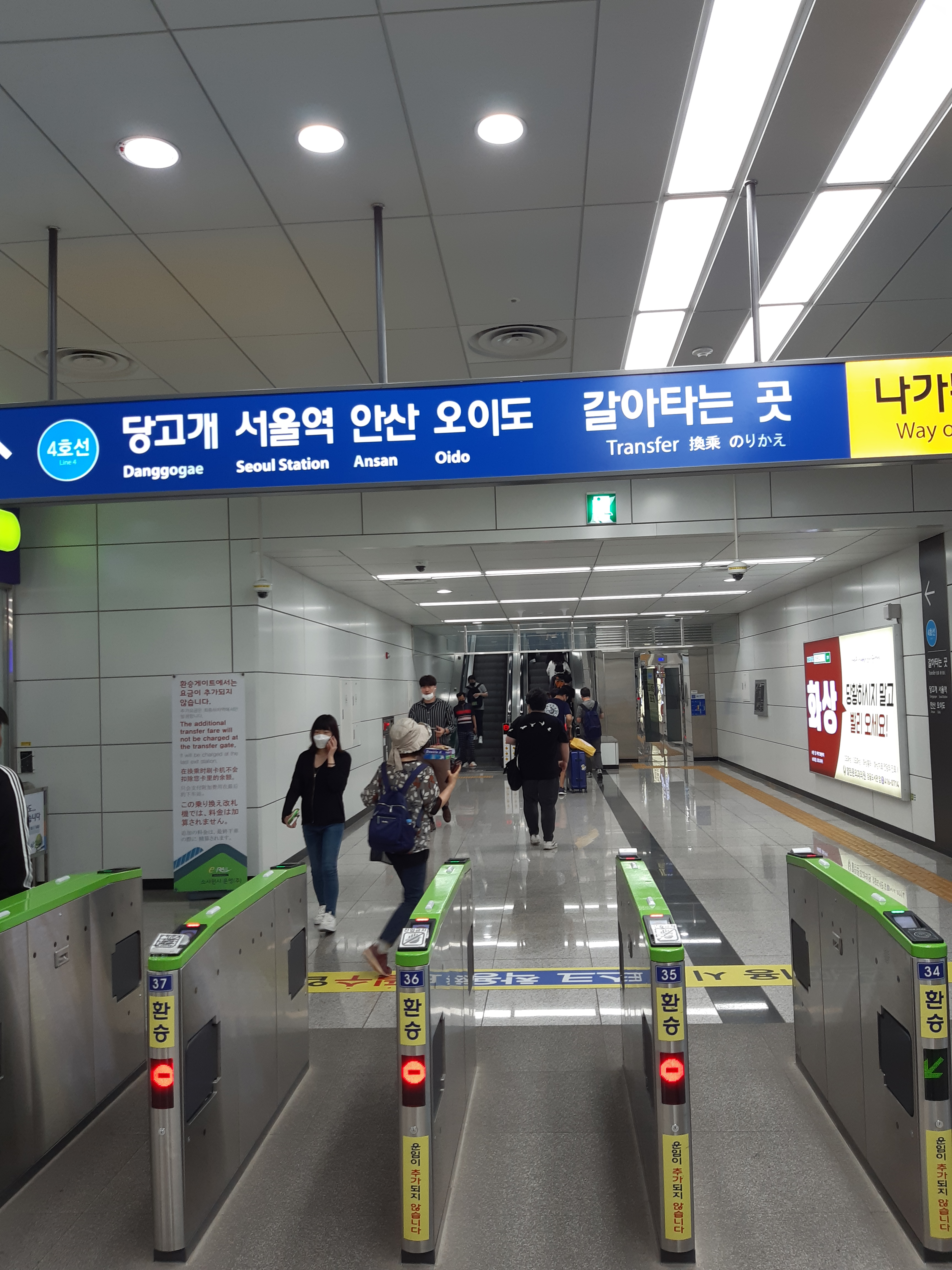 초지역 환승통로